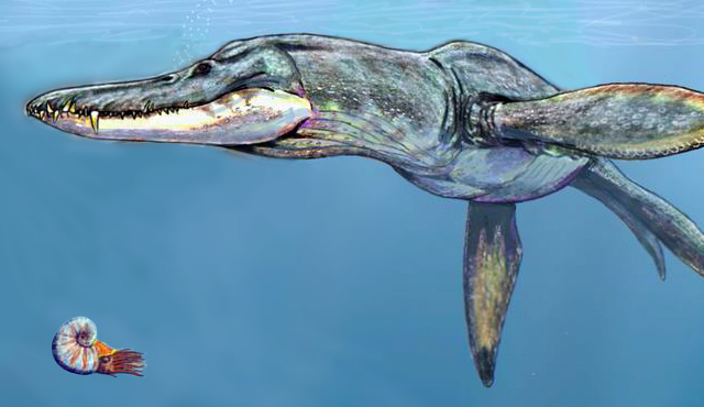 Pliosaurus rossicus.